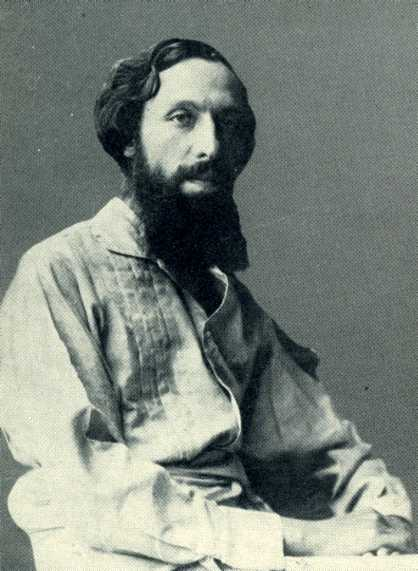 Jacques Mesnil (1872-1940) anarchiste et critique d'art belge